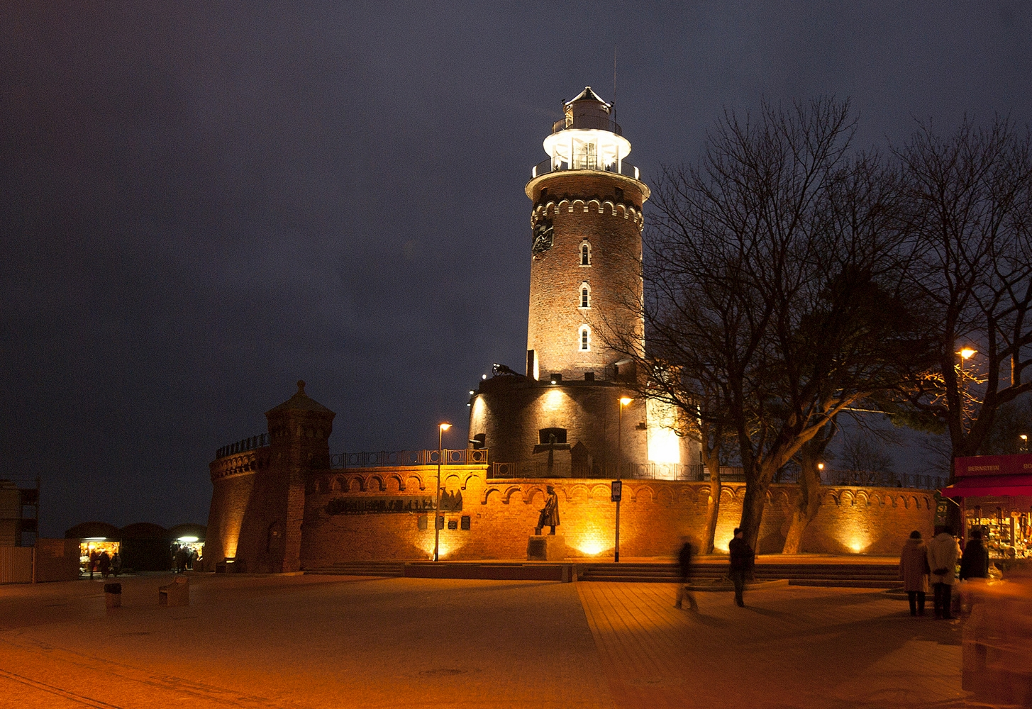 Kołobrzeg - odbudowana po wysadzeniu w 1945r wieża latarni